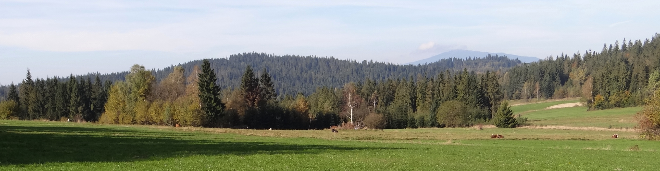 Wielki Dział